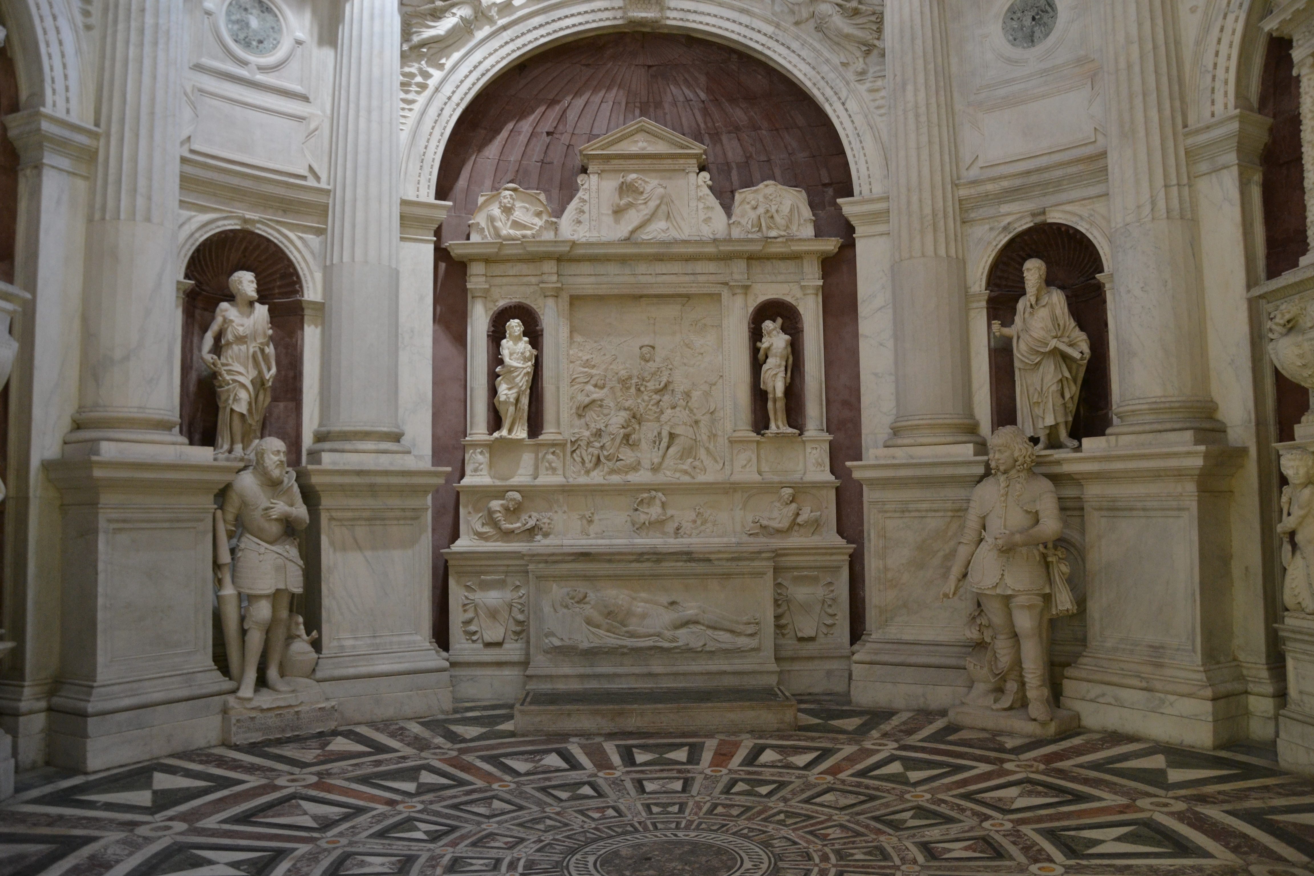 Napoli, chiesa di San Giovanni a Carbonara - Cappella Caracciolo di Vico, l'altare marmoreo dell'Epifania degli scultori spagnoli Diego De Siloé e Bartolomé Ordoñez del 1516 circa